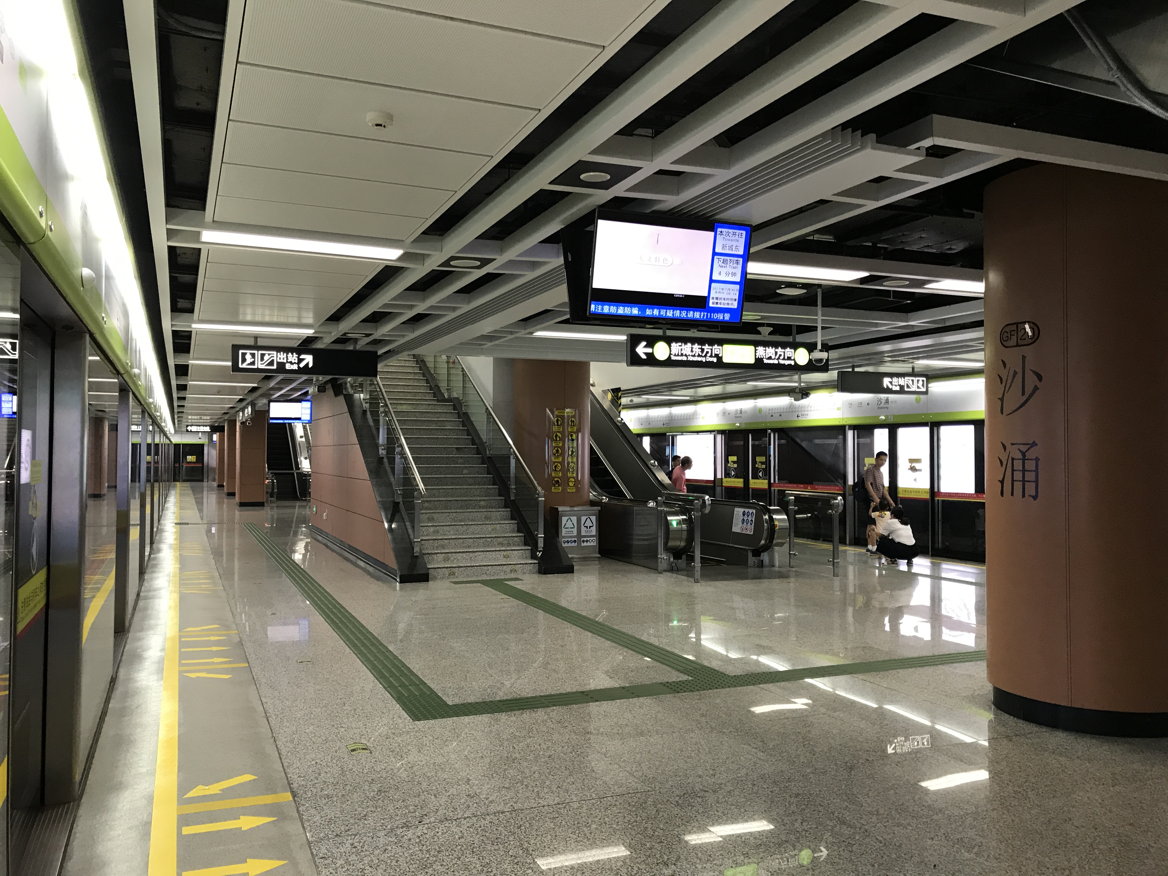 广佛地铁沙涌站